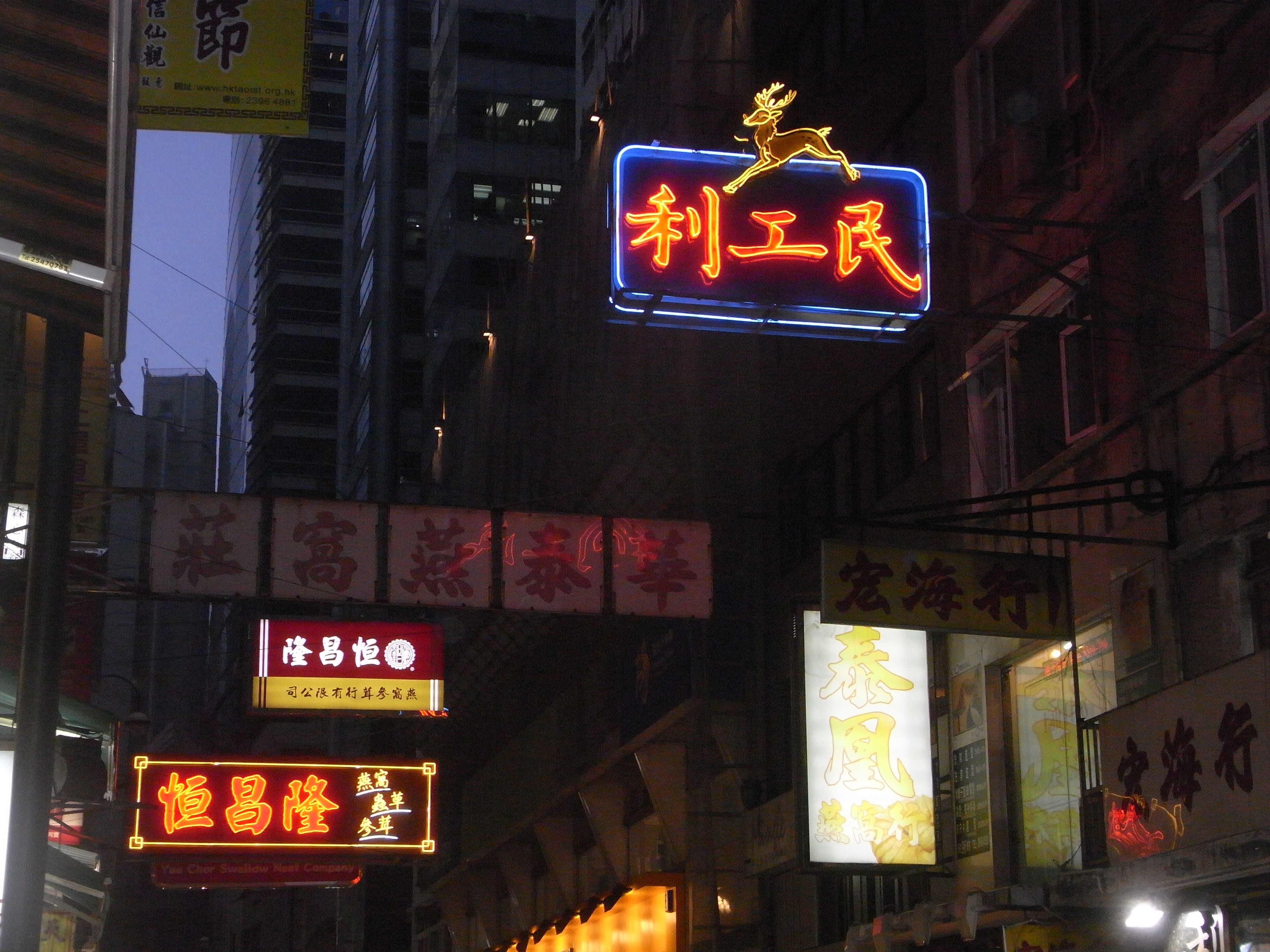 上環永樂街111號利工民門市部